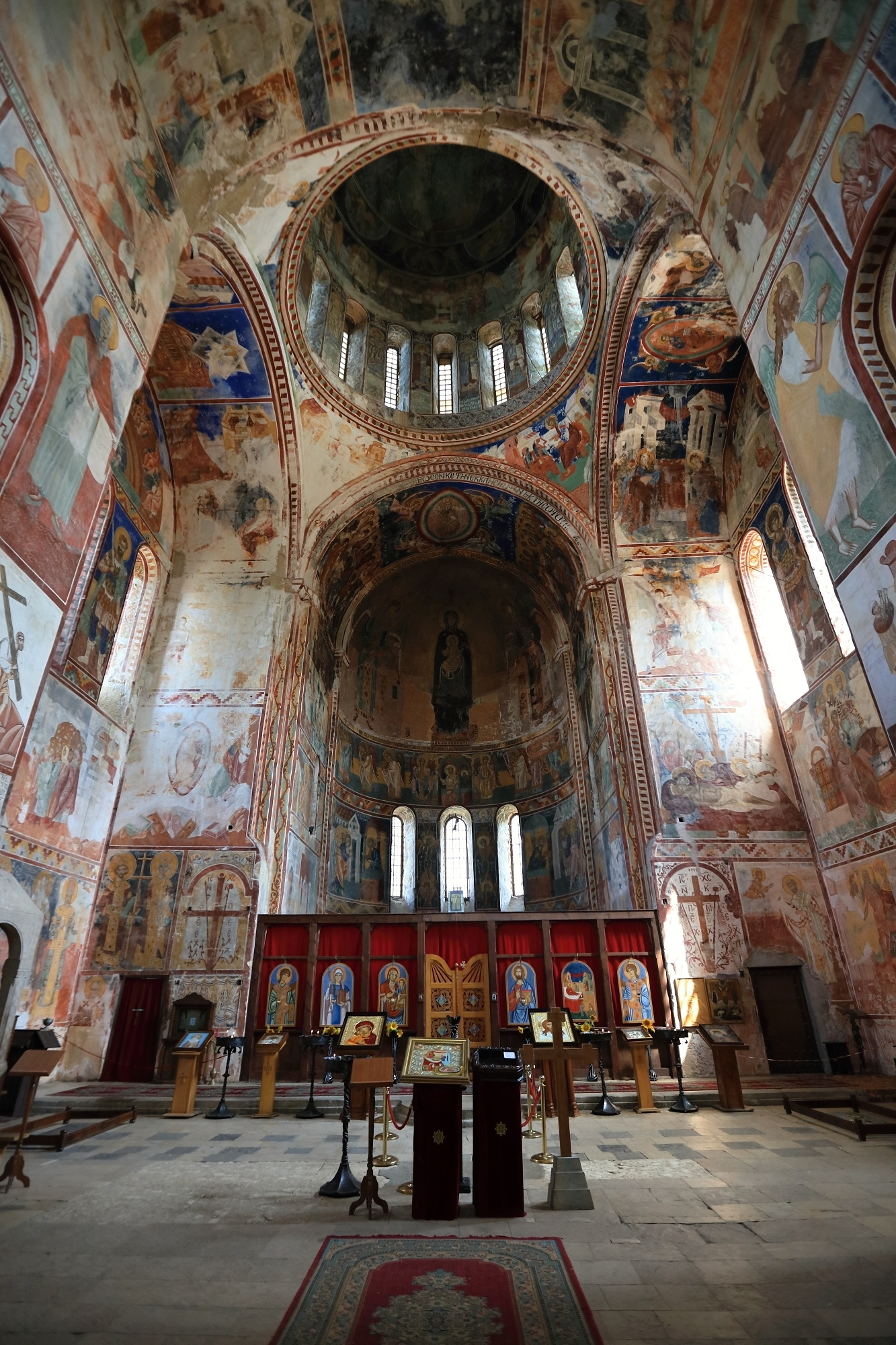 Interiér kláštera Gelati